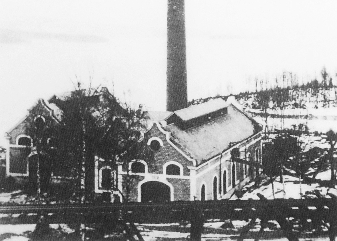 Lekombergs gamla karftcentral